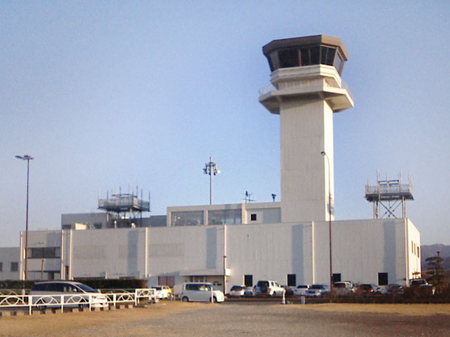 高松空港管制塔 - 日本国香川県高松市